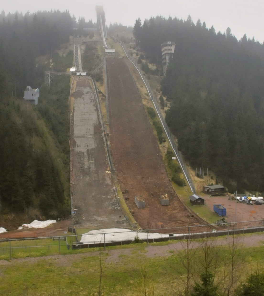 Schanzenanlagen im Kanzlersgrund, in Renovierung